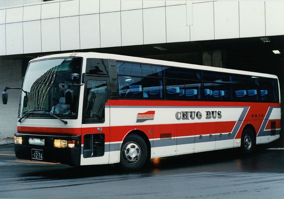 北海道中央バス 高速はやぶさ号 日野・セレガ U-RU2FTA 富士重7ＨＤ